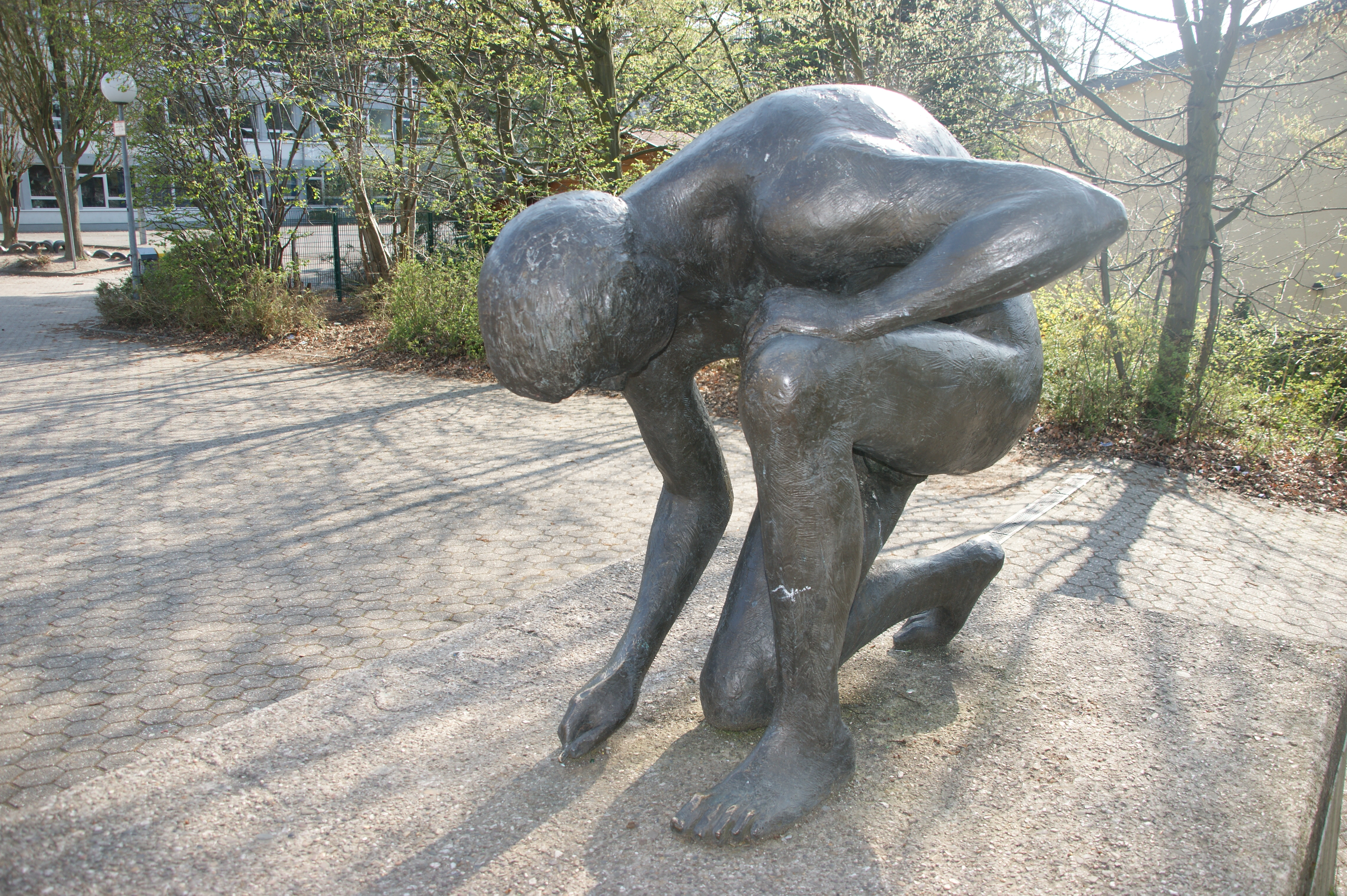 Archimedes-Bronzestatue (1980) von Ernemann Sander, Königswinter-Oberpleis